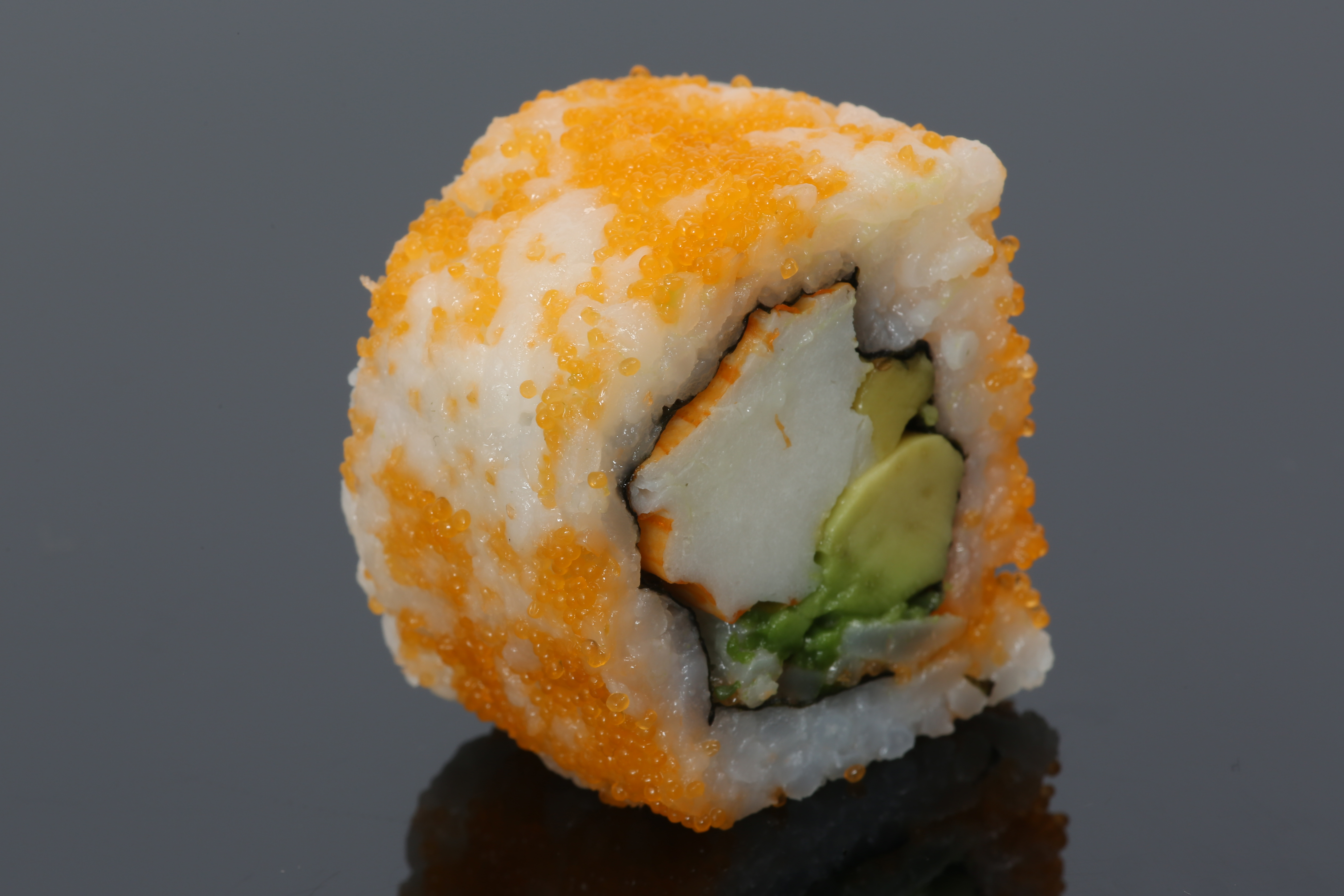 California Sushi